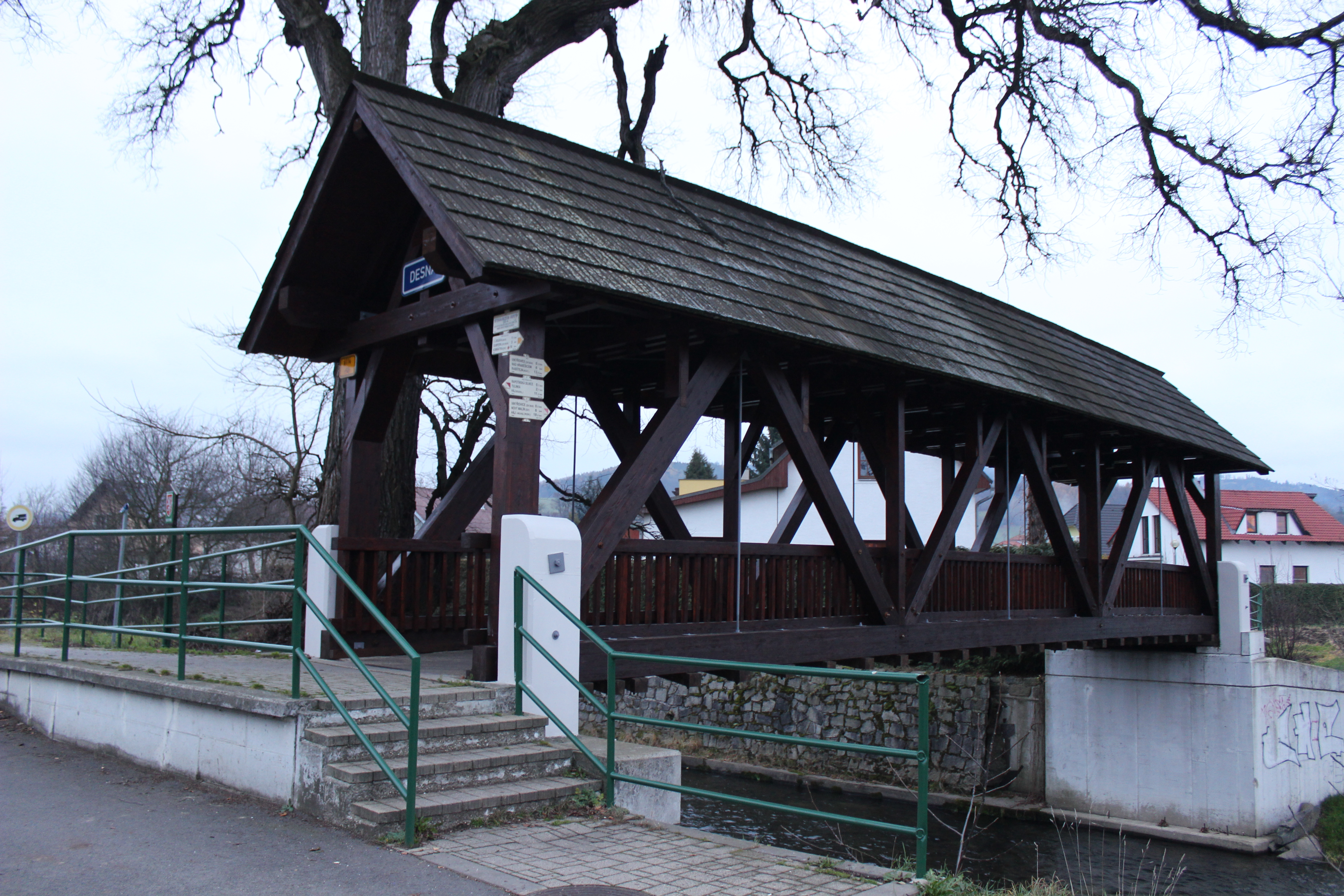 Zastřešená lávka ve Vikýřovicích (pohled od jihozápadu).